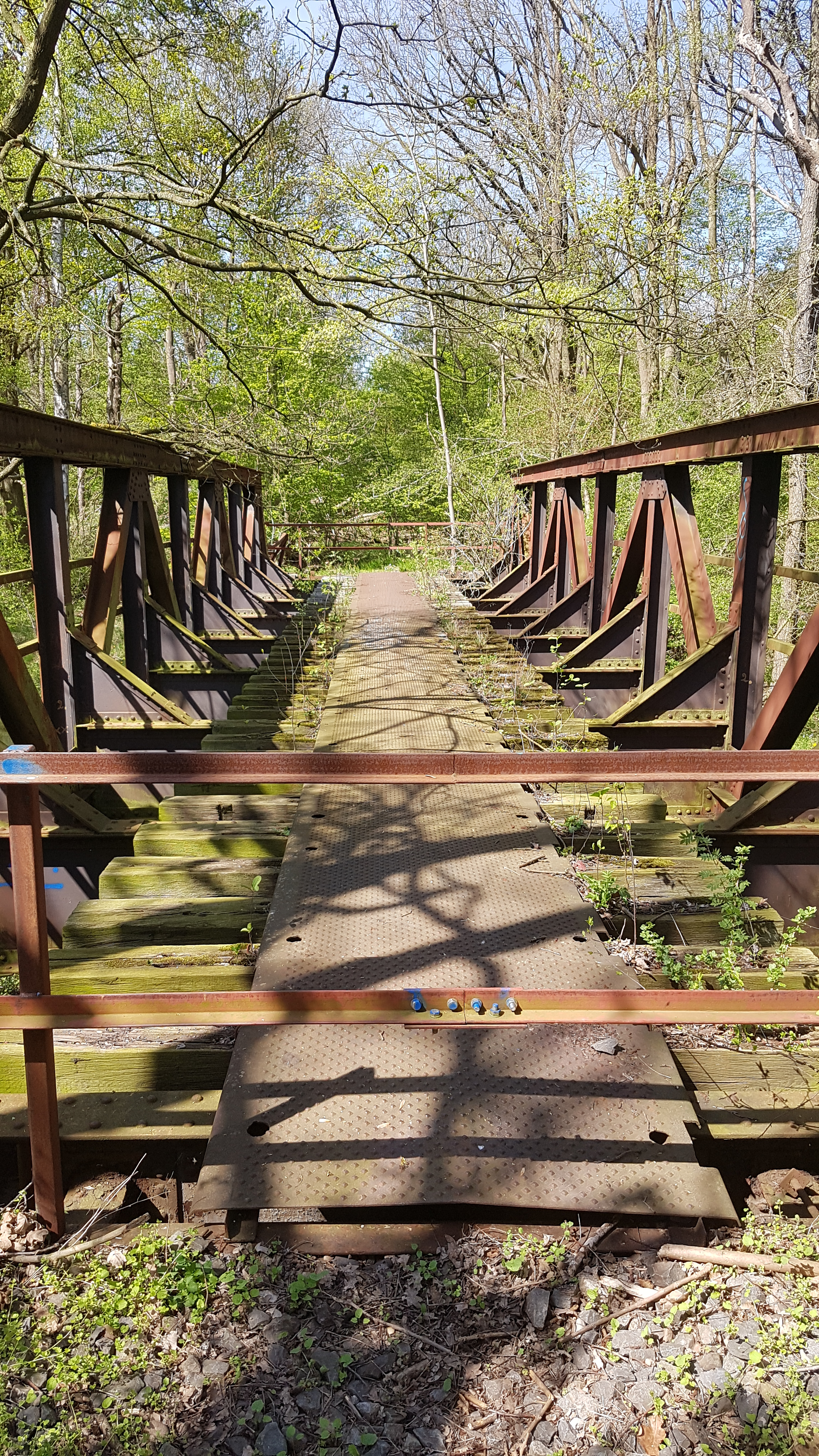 Eine der Brücken über die Fuhse bei Uetze